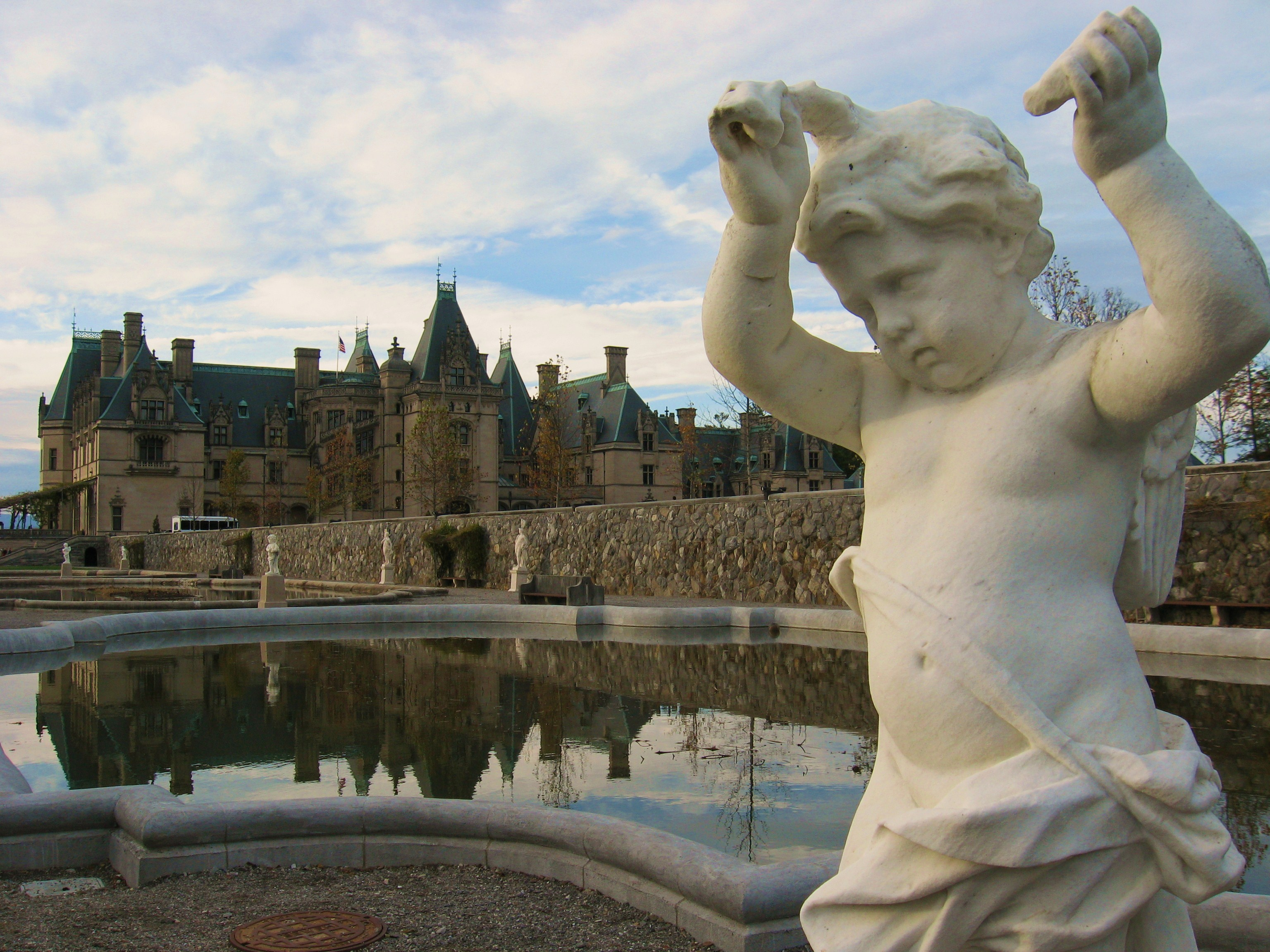 Biltmore Statue